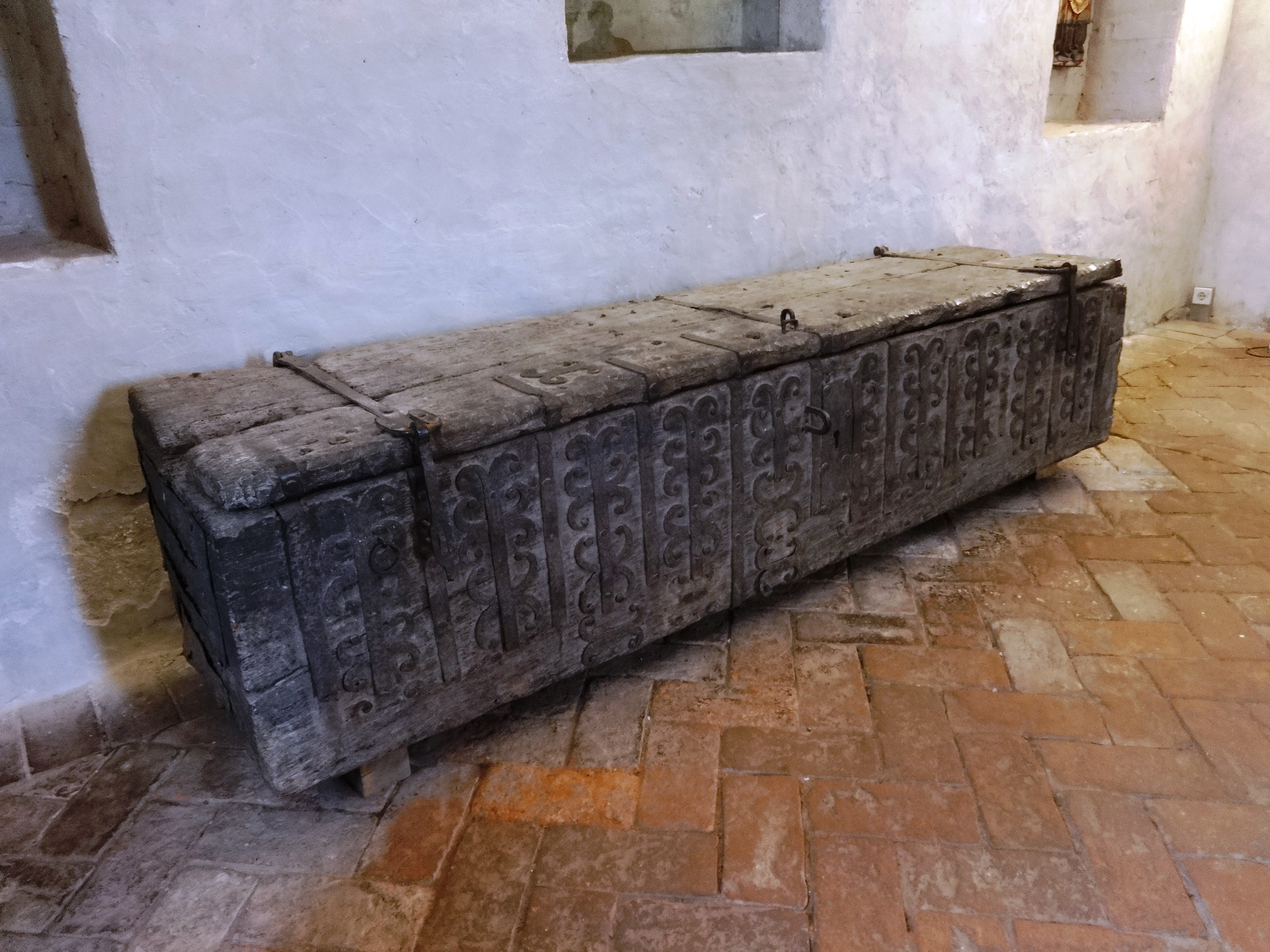 Blick von bzw. in die dreischiffige gotische Hallenkirche in Jüterbog